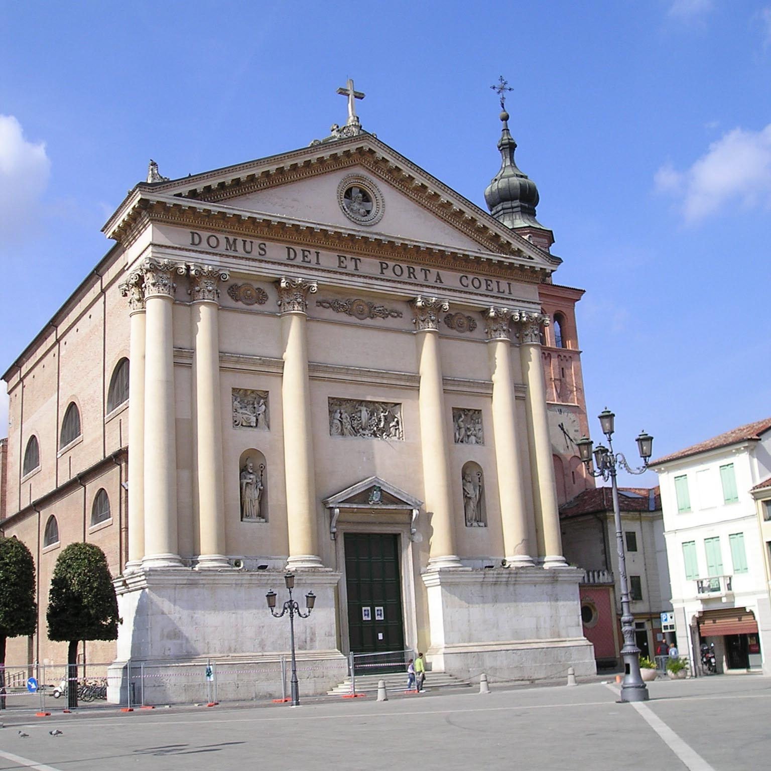 Cittadella, il Duomo di San Prosdocimo.